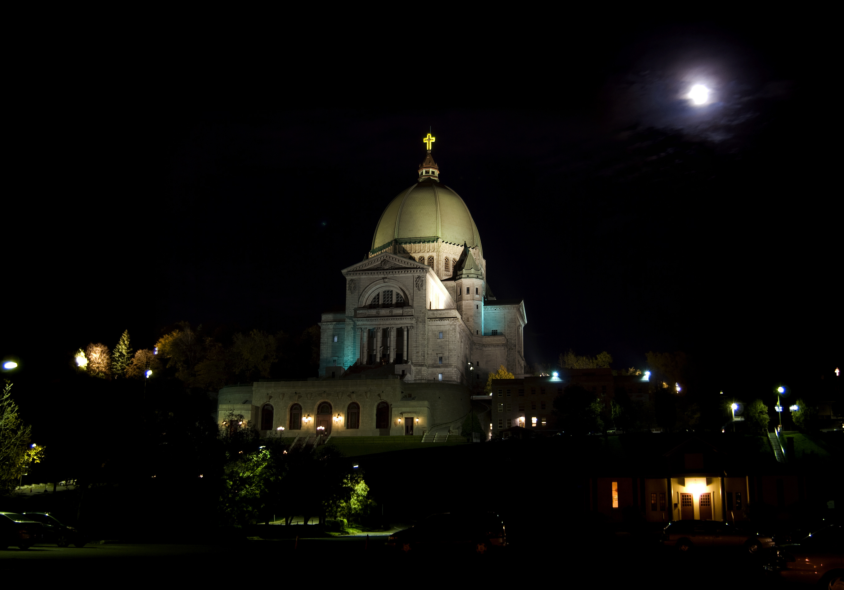 Oratoire Saint-Joseph du Mont-Royal. Montreal, Quebec, Canada.